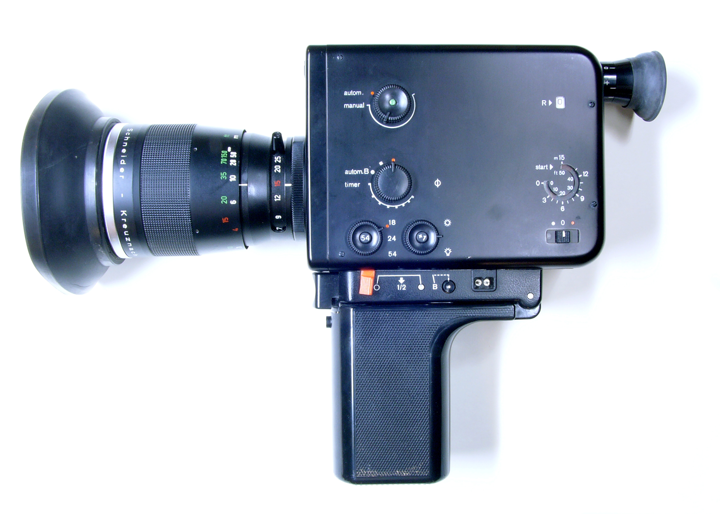 Braun Nizo 800 Super-8 film camera